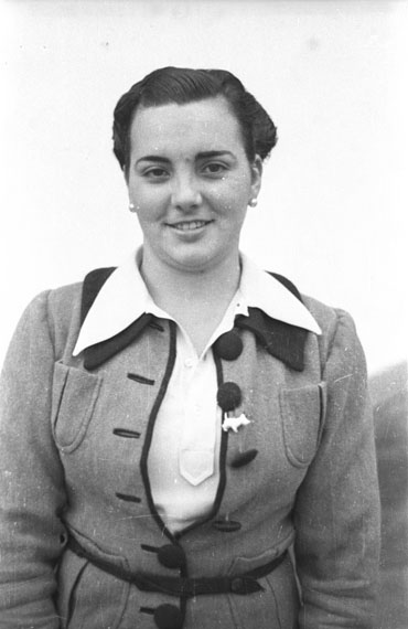 Karmele Urresti Ondarroako emakumea Eresoinka taldean parte hartu zuen garaian